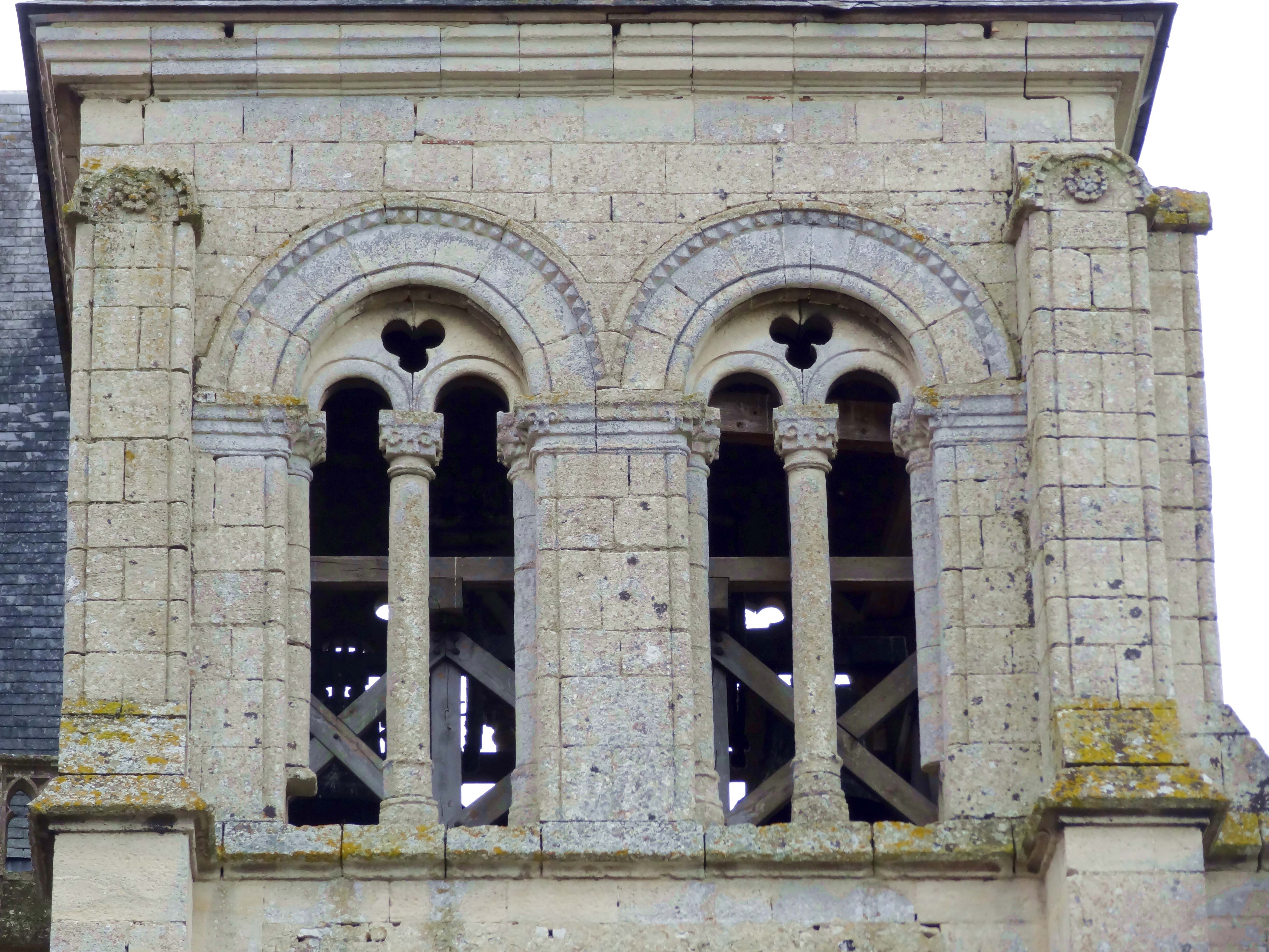 Église Saint-Ouen de Therdonne - voir titre.